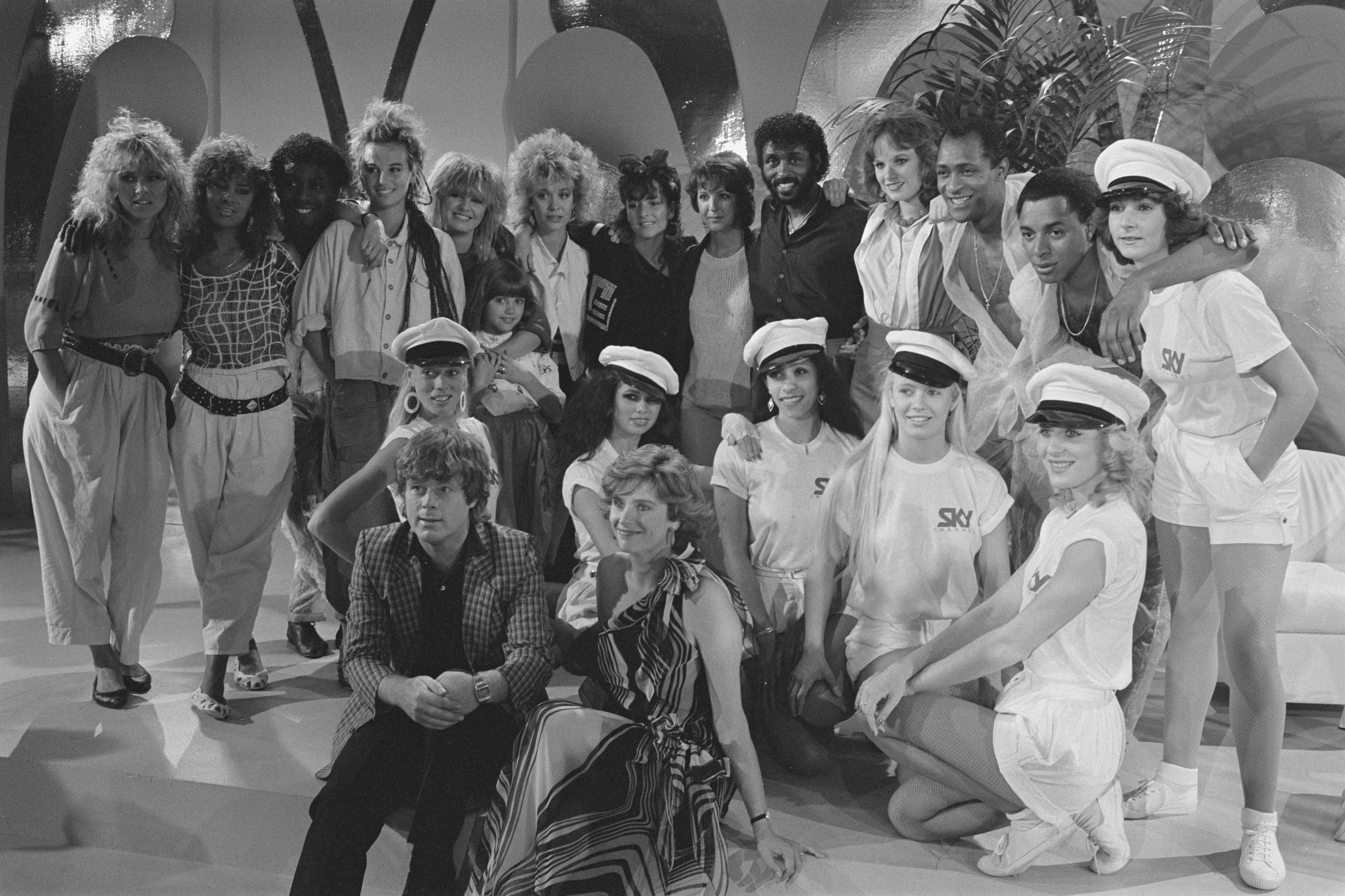 Uitzending commerciële zender Sky Channel vanuit Hilton Hotel Amsterdam. Presentatoren Willem Ruis en Amanda Cuthbert. Met achter hen (vlnr meidengroep Dolly Dots, zangeres Lori Spee, Forrest, Suzanne Michaels, popgroep Imagination en de Sky Channel girls (showballet Penney de Jager) Dolly Dots vlnr: Anita Heilker, Esther Oosterbeek, Patty Zomer, Angela Kramers, Ria Brieffies en Angela Groothuisen. Tussen Esther Oosterbeek en Patty Zomer de bassist van de groep Imagination. Voor Angela (Sjeel) Kramers staat nog een jong meisje. 27 juni 1984